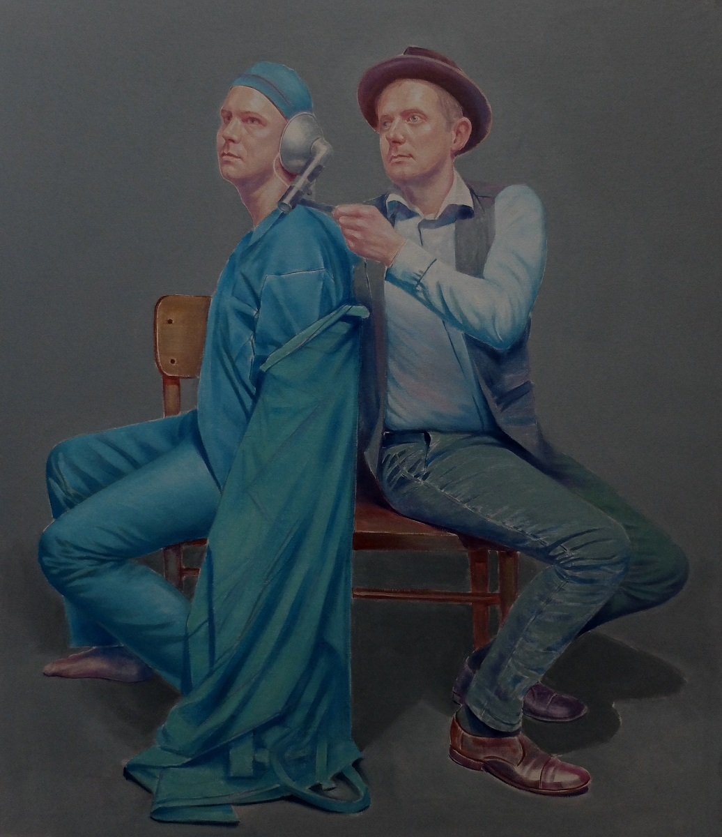 Sylwester Stabryła, Badacze Natury, olej na płótnie, 140x120cm, 2018r